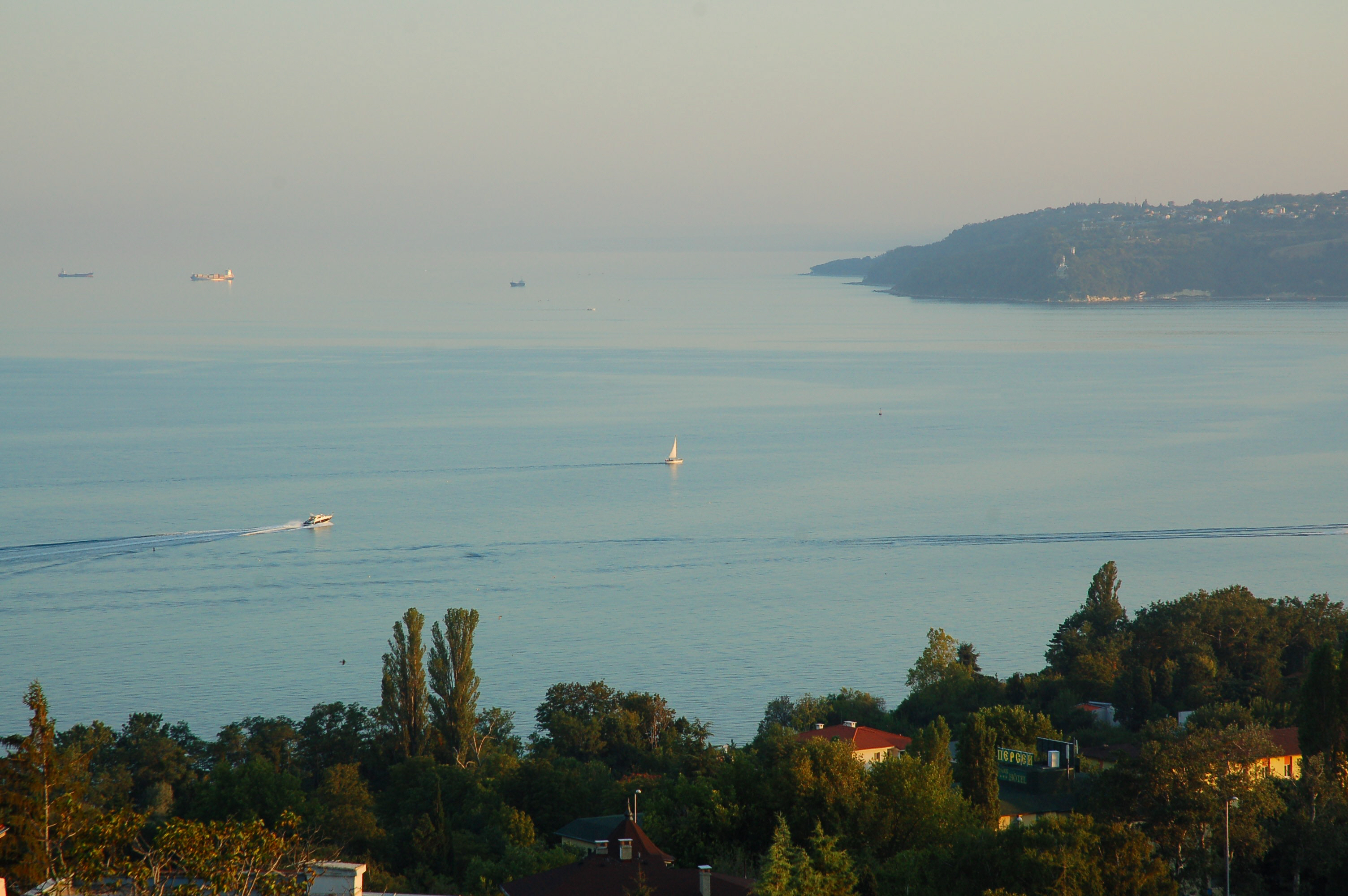 Varna Bay